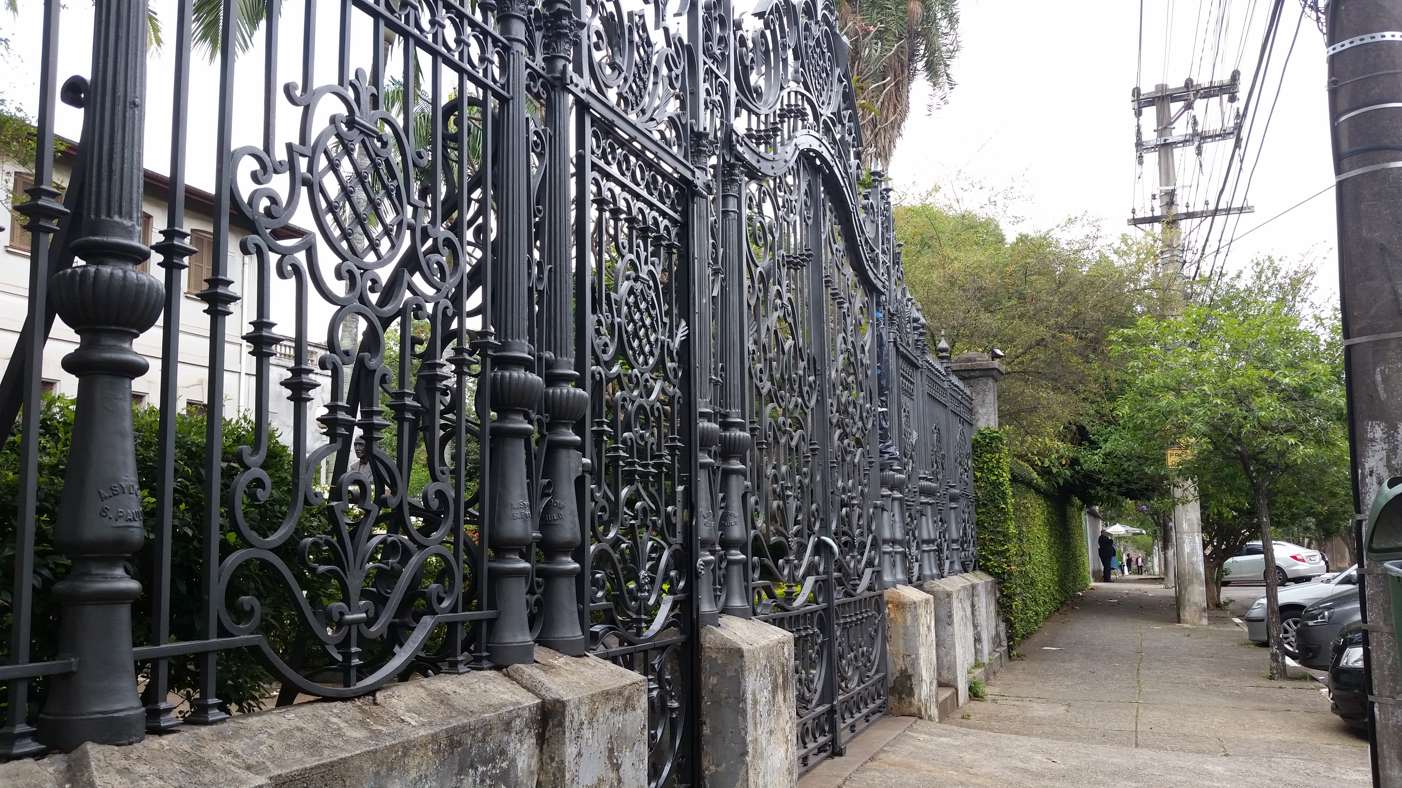 O portão de ferro é a primeira fachada do Internato Nossa Senhora Auxiliadora, localizado na Rua Dom Luís Lasanha, 300. no bairro Ipiranga, na cidade de São Paulo.